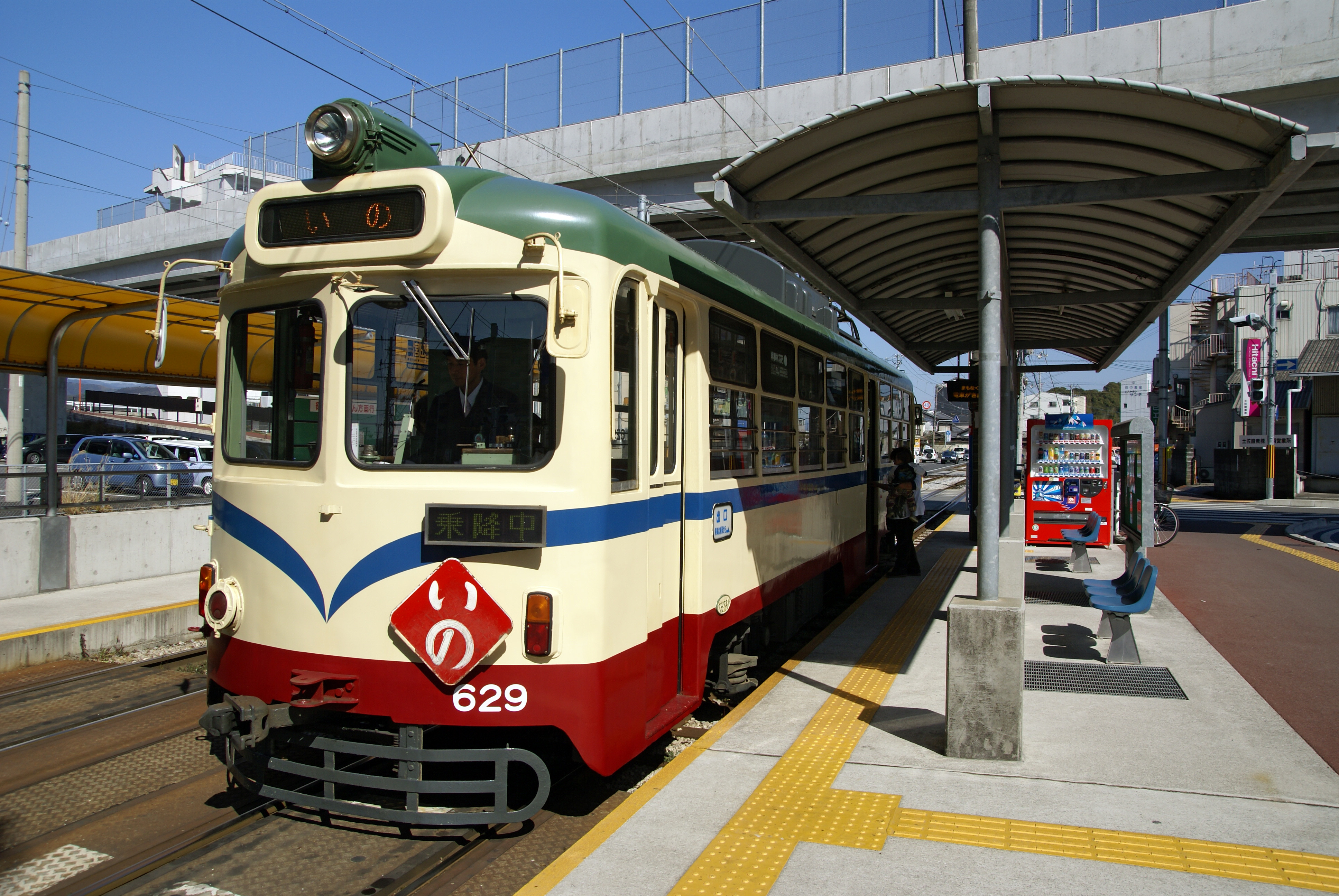 Kenritsu-bijutukan-dori Station in Kochi, Kochi prefecture, Japan